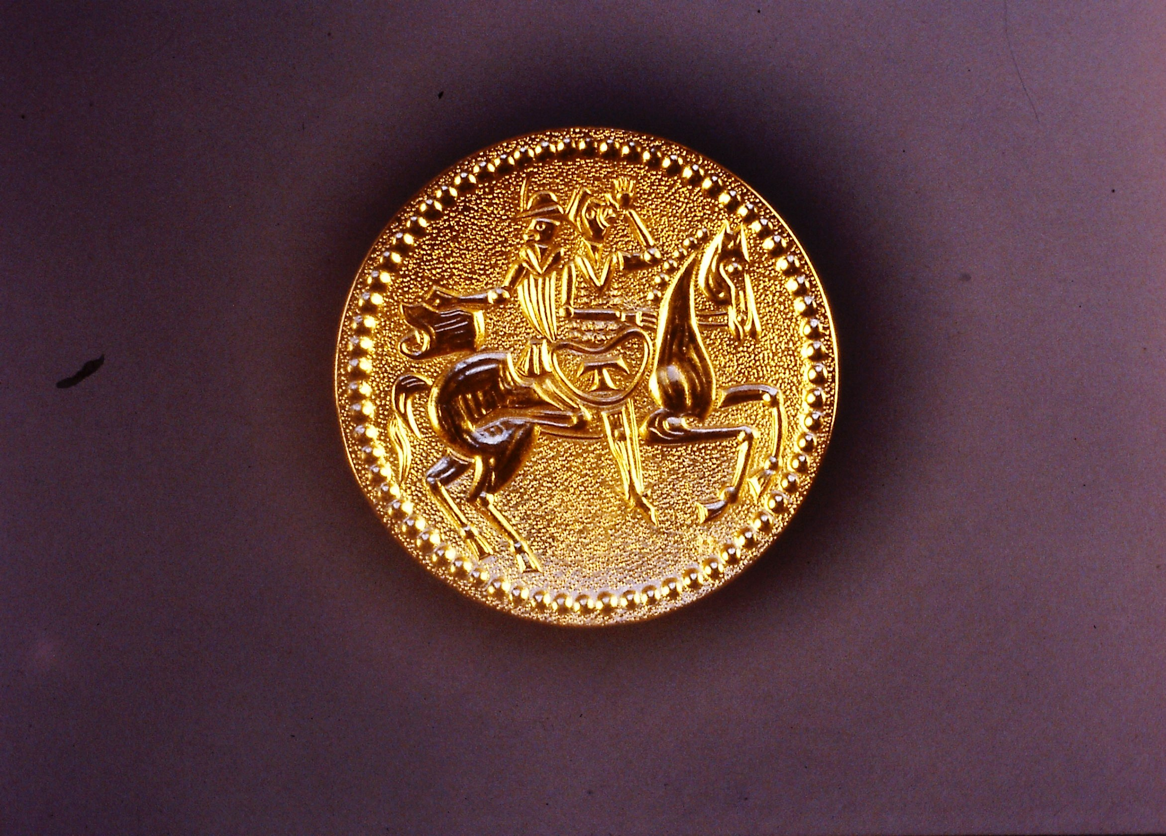 Bouton de porte d'accès au ordinateurs des centres du Ritter. Bouton de porte doré où l'on retrouve les symboles des Transmissions.